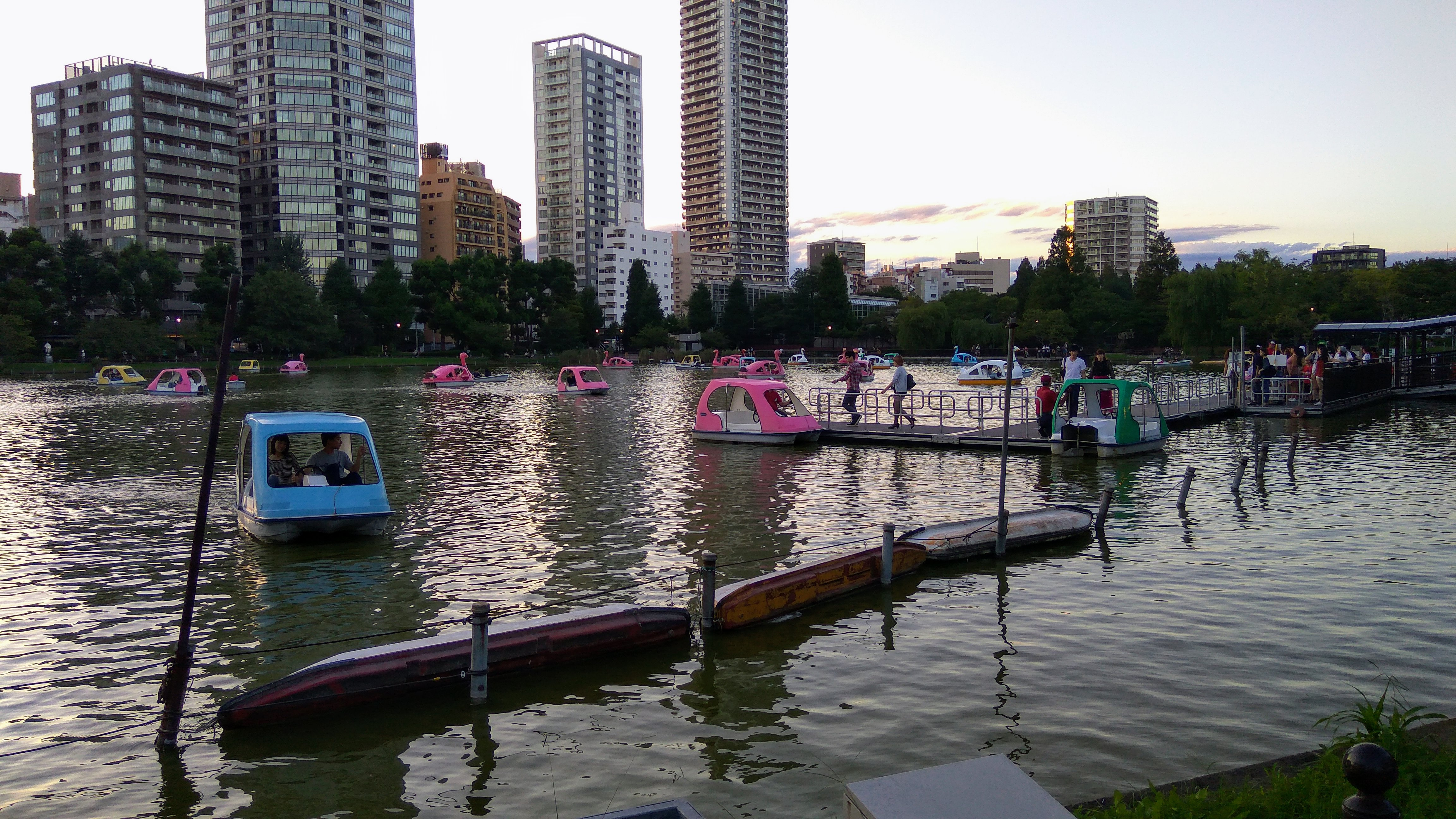 Barcas en el estanque Shinobazu, situado en el parque Ueno (Tokio)